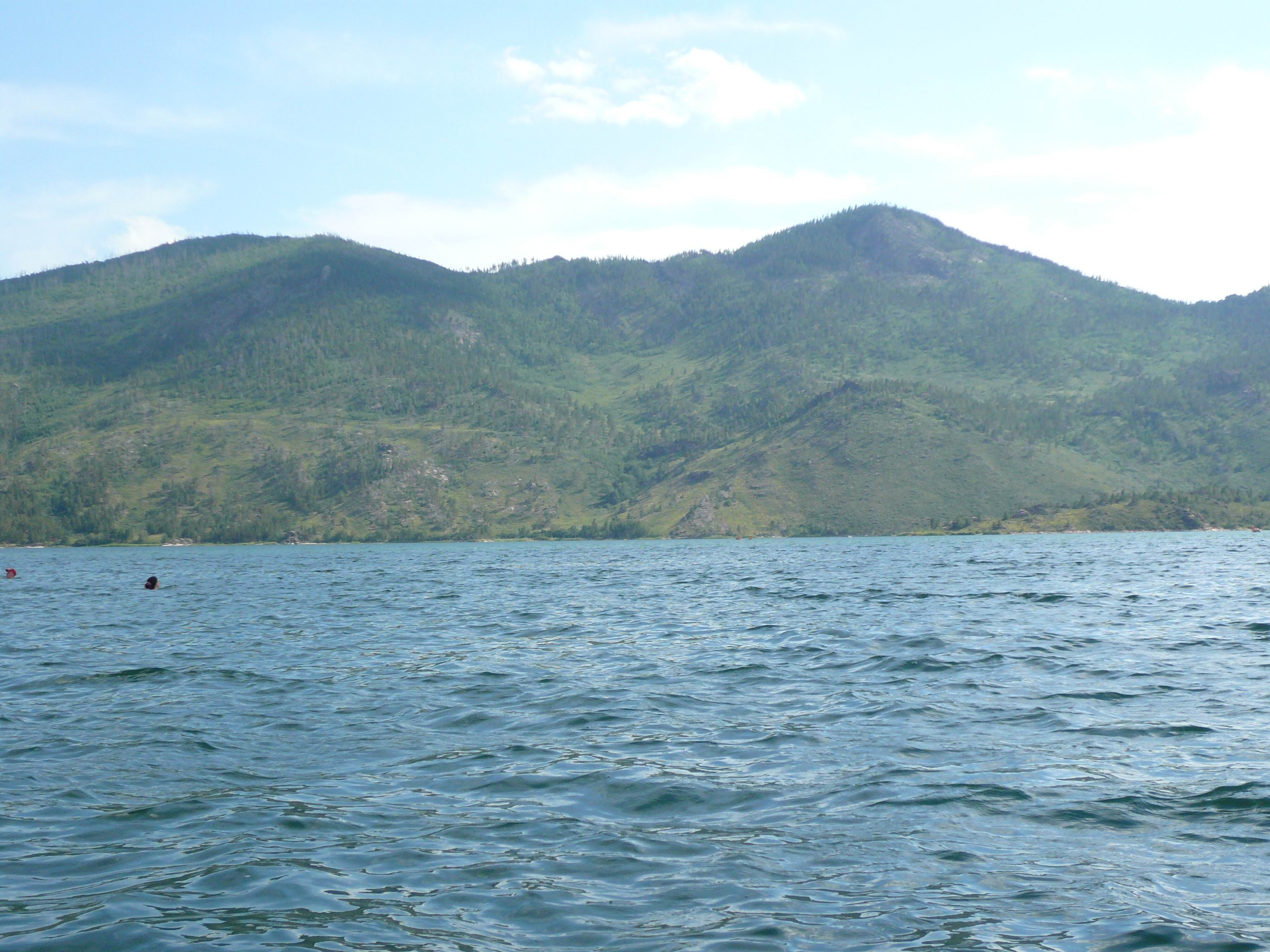 Lake Dzhasybay